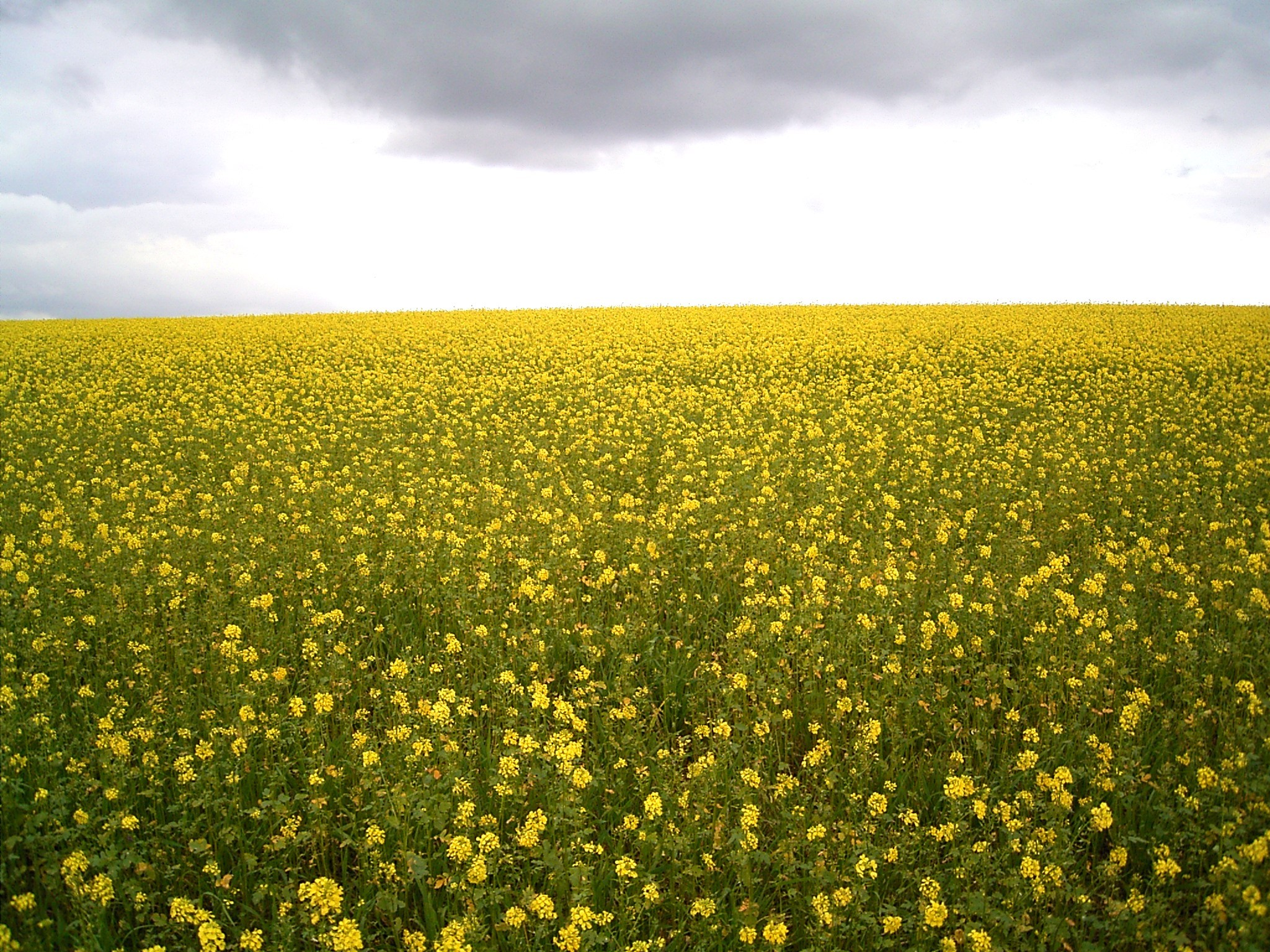 Brassica napus